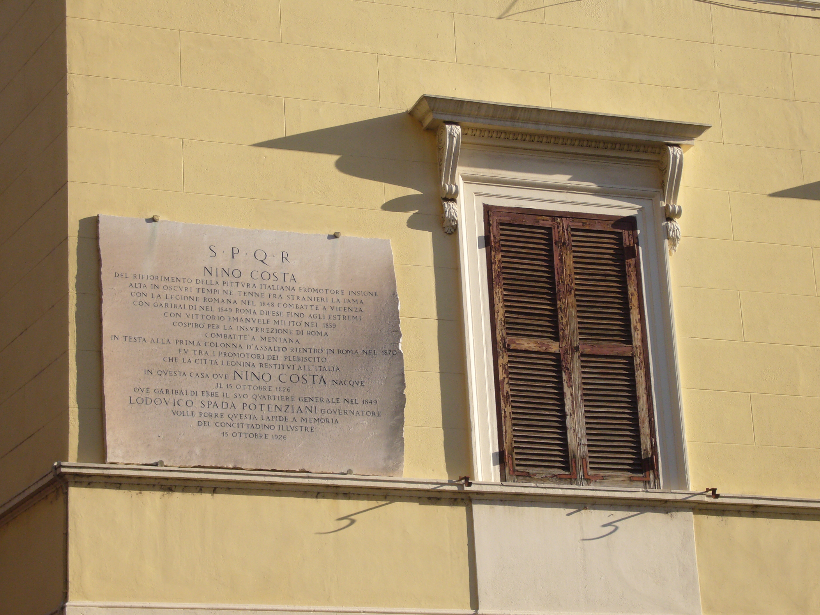 Roma, piazza san Francesco. Targa in memoria di Nino Costa pittore e patriota sulla facciata della casa di famiglia.